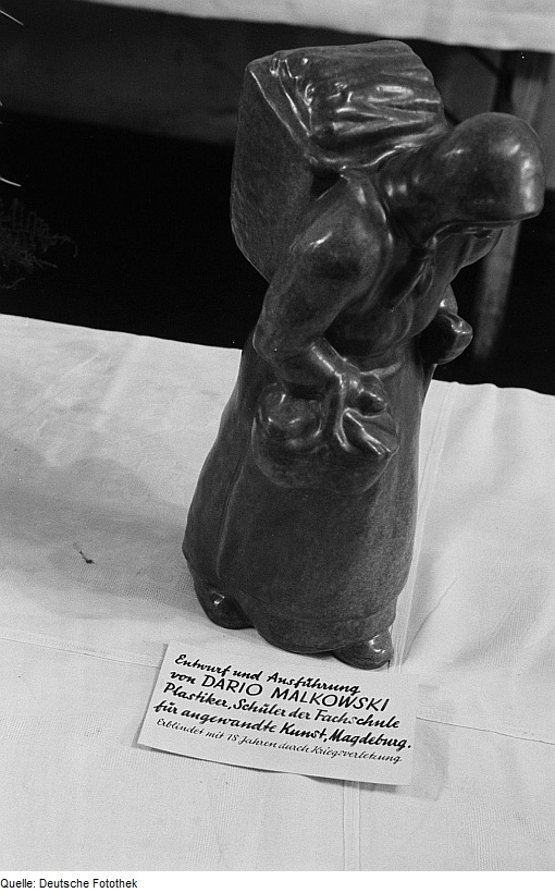 Original image description from the Deutsche FotothekPlastik von Dario Malkowski, Schüler der Fachschule für angewandte Kunst Magdeburg, erblindet mit 18 Jahren